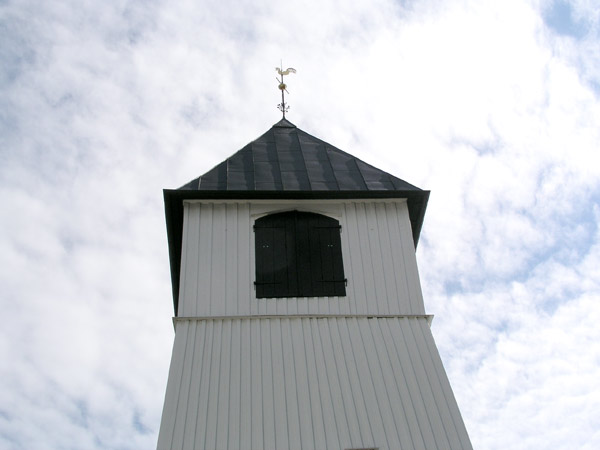 Klockstapel med tupp vid Drothems kyrka